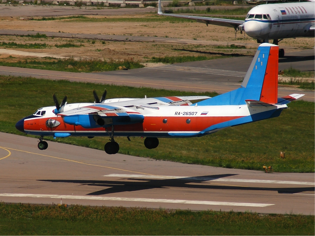 SkyTest Antonov An-26